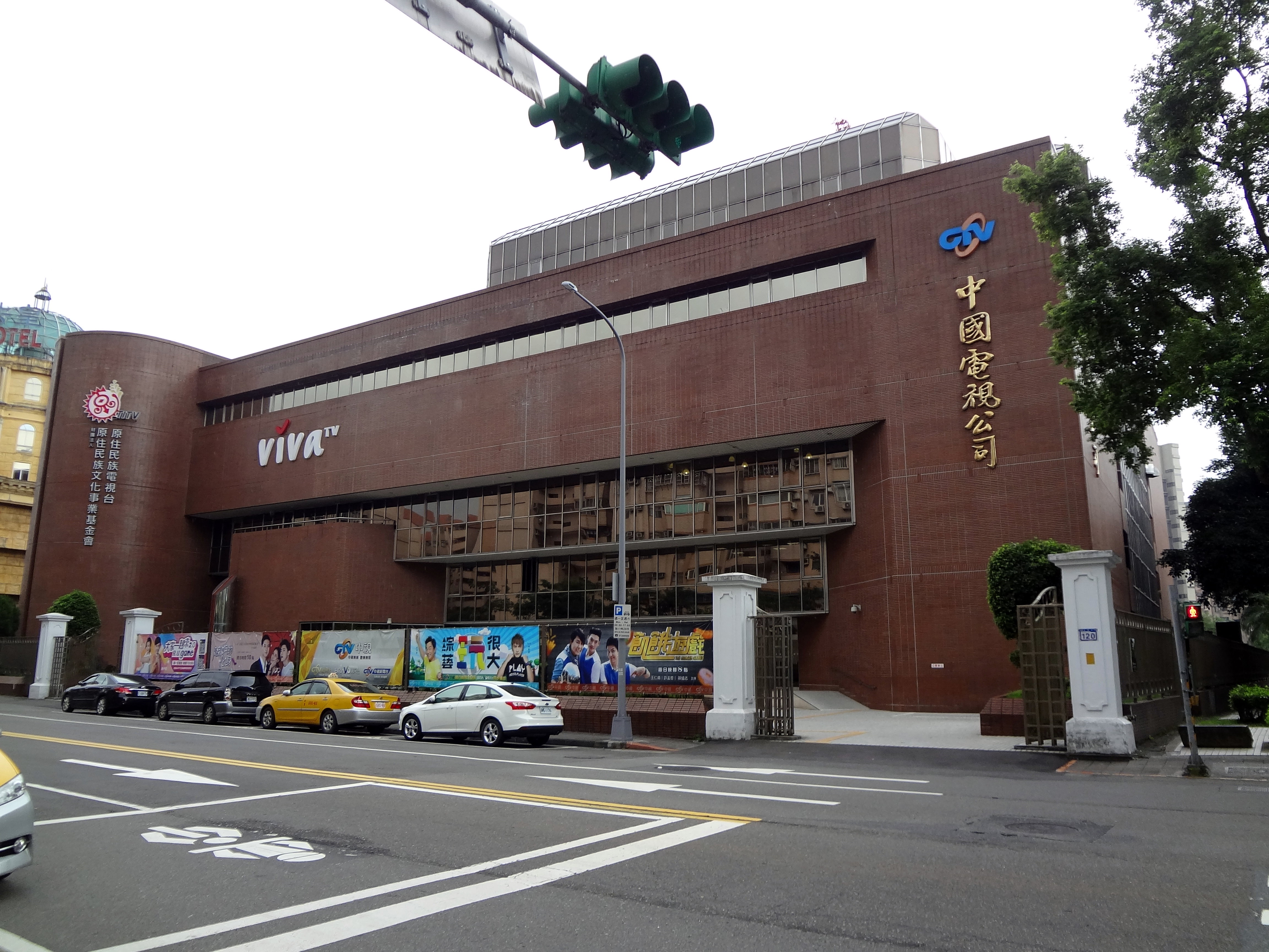 中國電視大廈，位於臺北市南港區重陽路120號。原住民族電視台總部設於5樓，ViVa TV總部設於6樓。